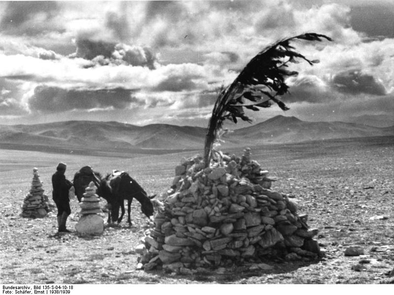 Kongrala, Überschreitung, Obos, Pferde und Grenzstein